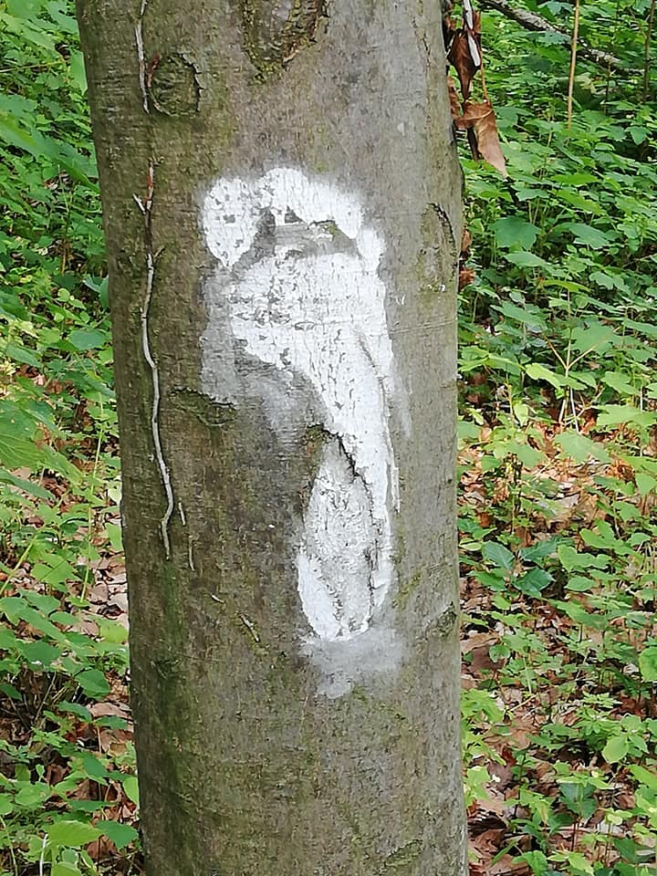 Silhouette einer Fußsohle, aufgemalt an einem Baumstamm als Wegezeichen der GesundheitsPfade „barfuß wanderfit“ im Kurwald von Bad Iburg